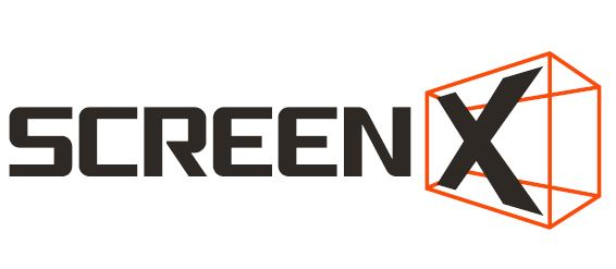 스크린X 공식 로고